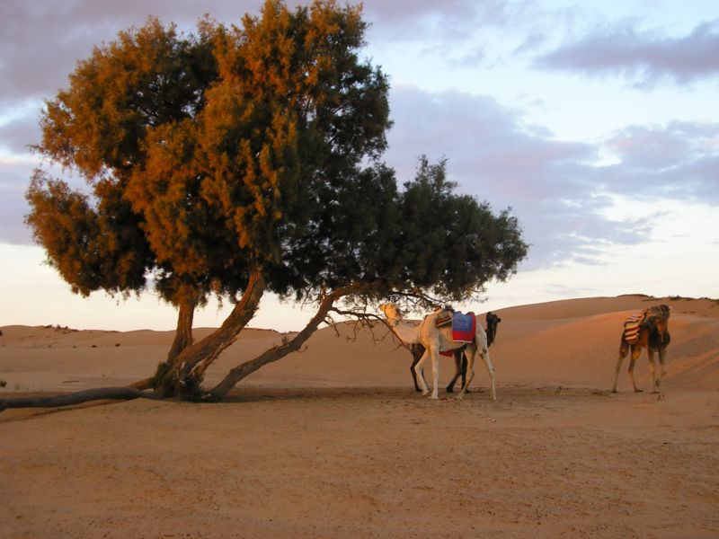 Photographie personnelle prise en décembre 2004, montrant un dromadaire broutant la maigre végétation du désert à Ksar Ghilane en Tunisie.